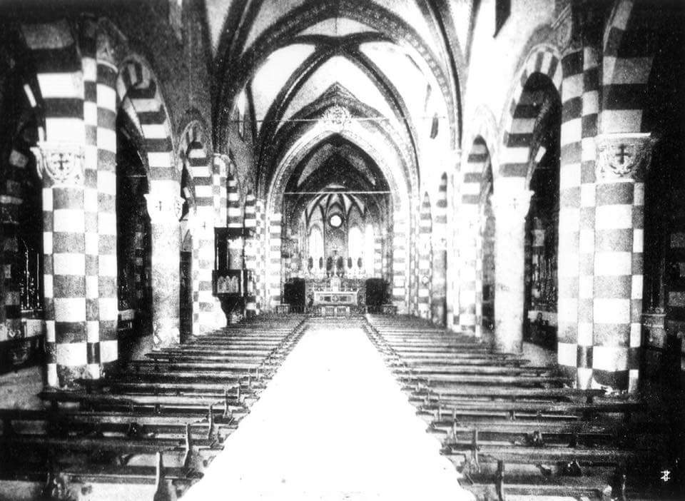 L'interno della Chiesa di Sa Francesco a Mirandola, prima del restauro degli anni 1930